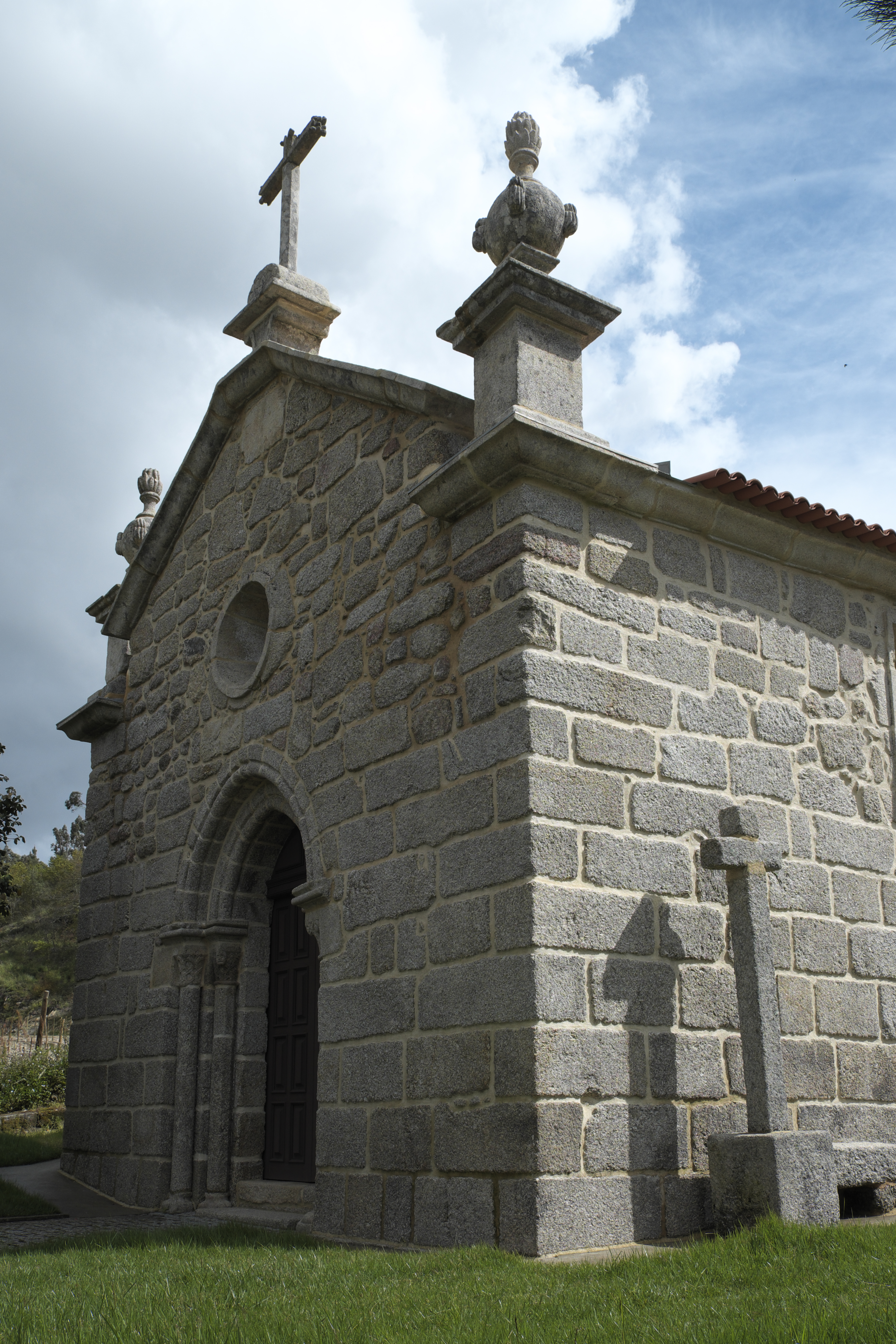 Romanische Kirche São Salvador in Real (Amarante), einem zur Stadt Amarante gehörenden Ort im Distrikt Porto in Nordportugal